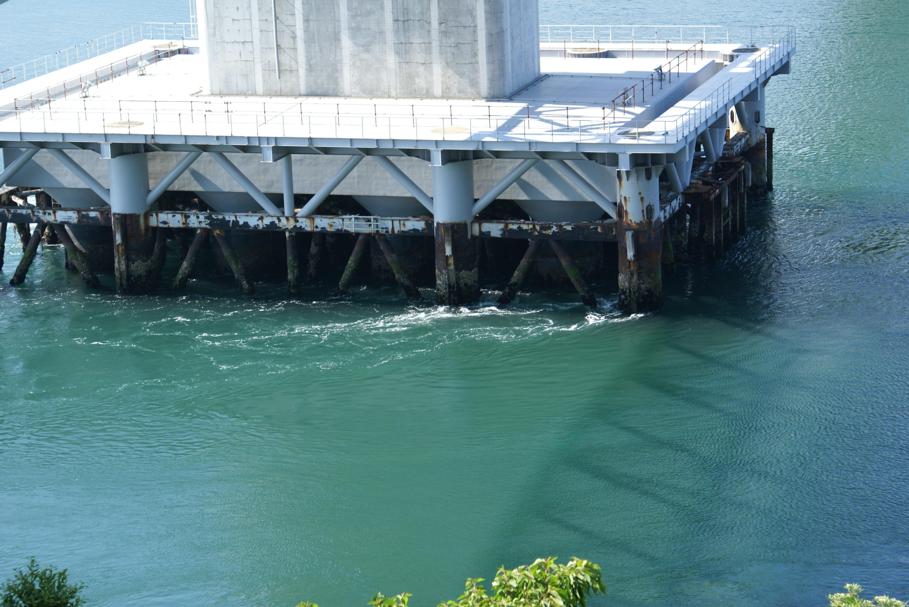 Ohbata-seto. Yamaguchi-pref, Japan.